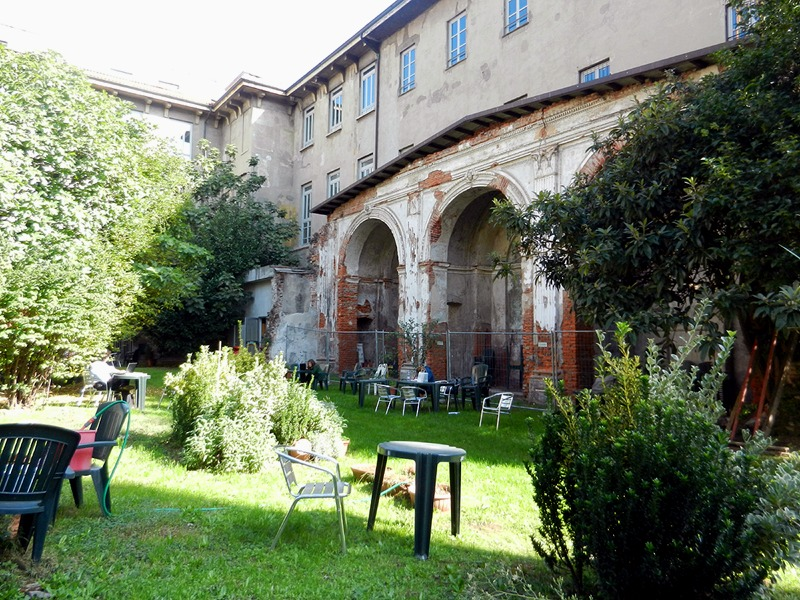 Milano - Resti della Chiesa di S. Bernardo in Corso di Porta Vigentina